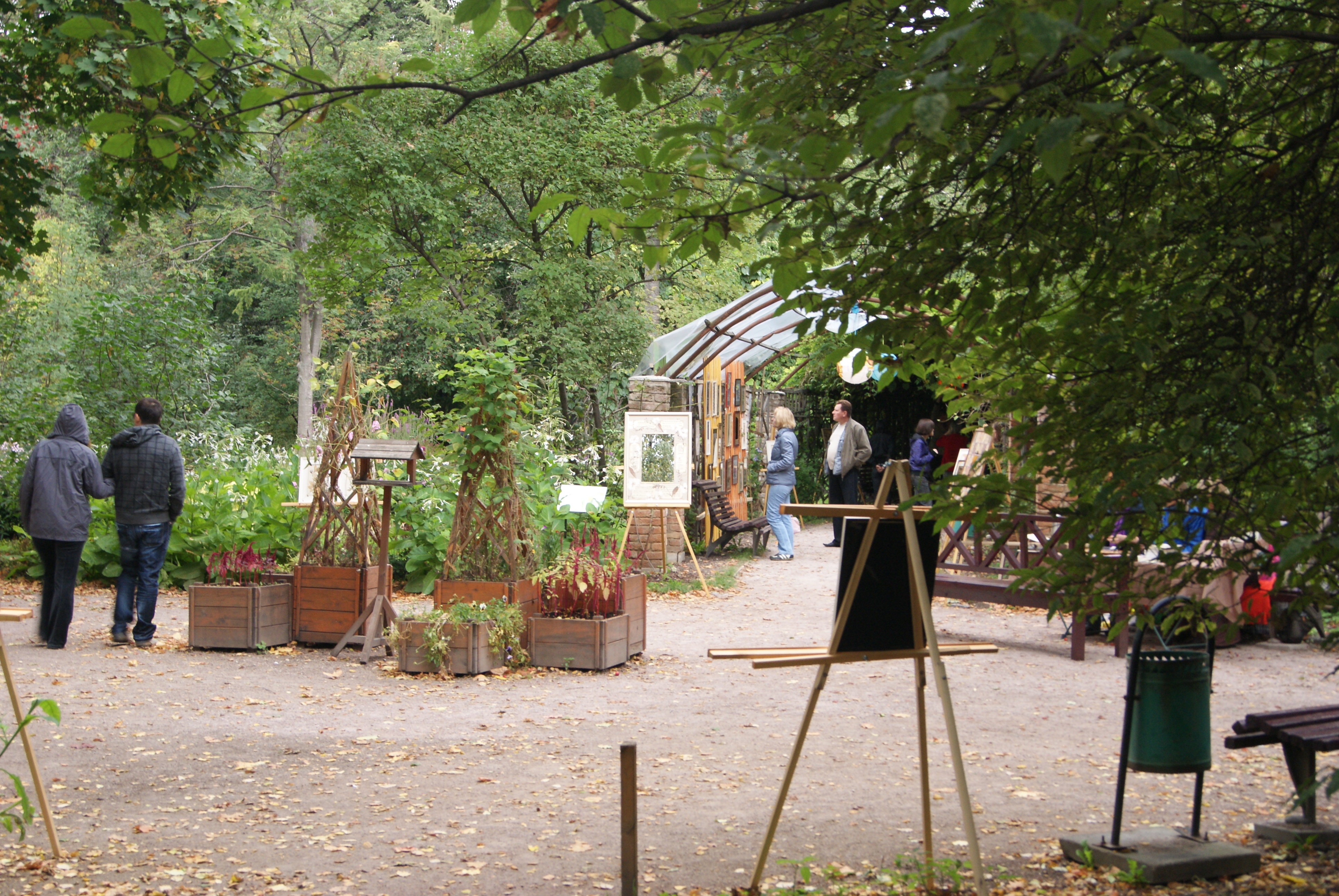 Aptekarsky Ogorod